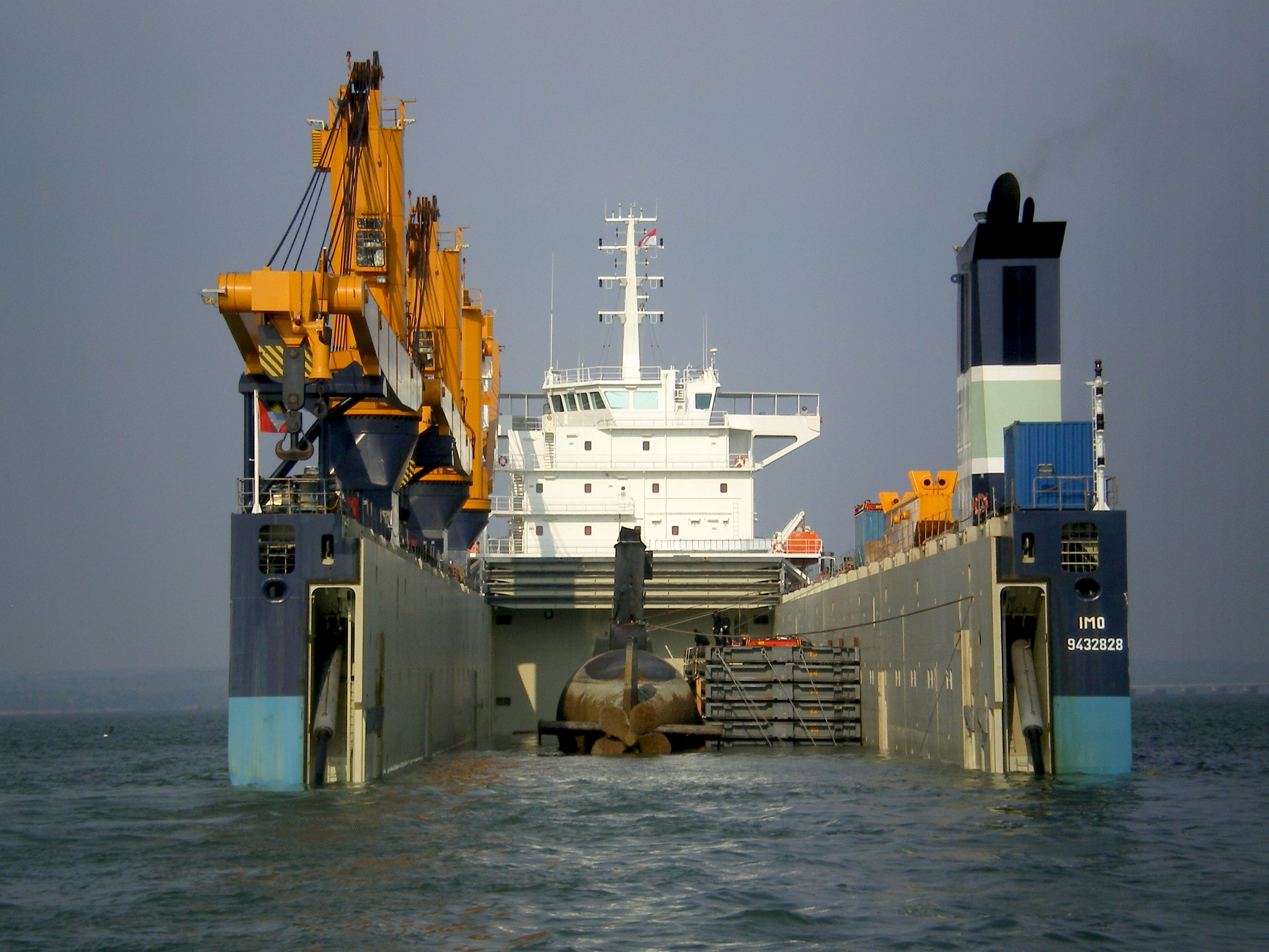 Combi Dock III loading submarine